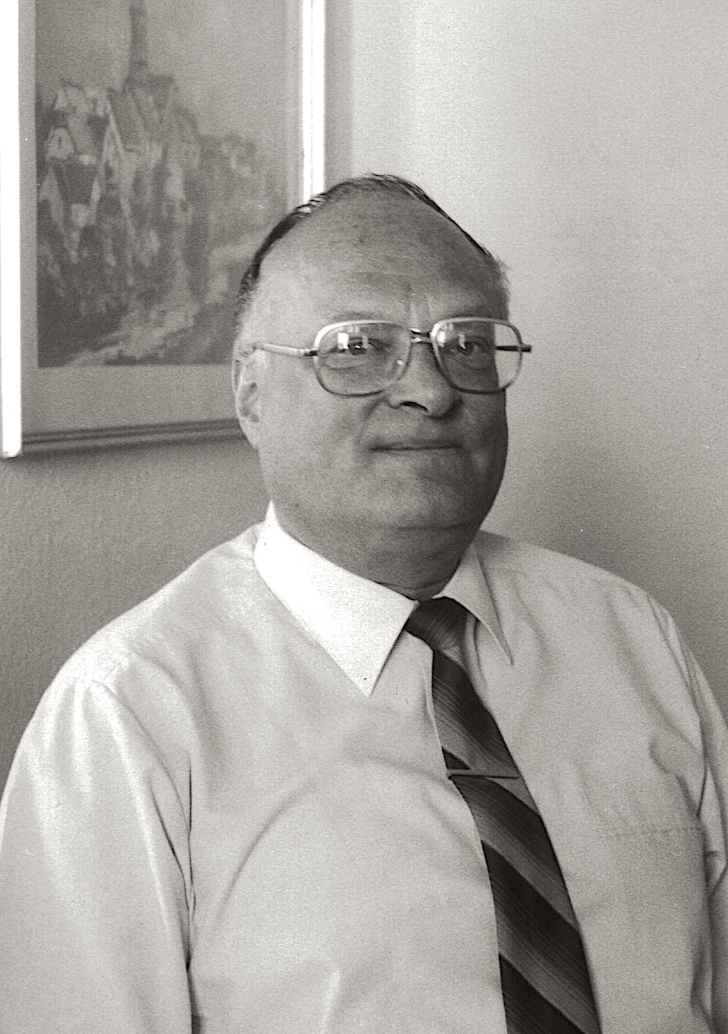 Hans-Klaus Heinz 1985